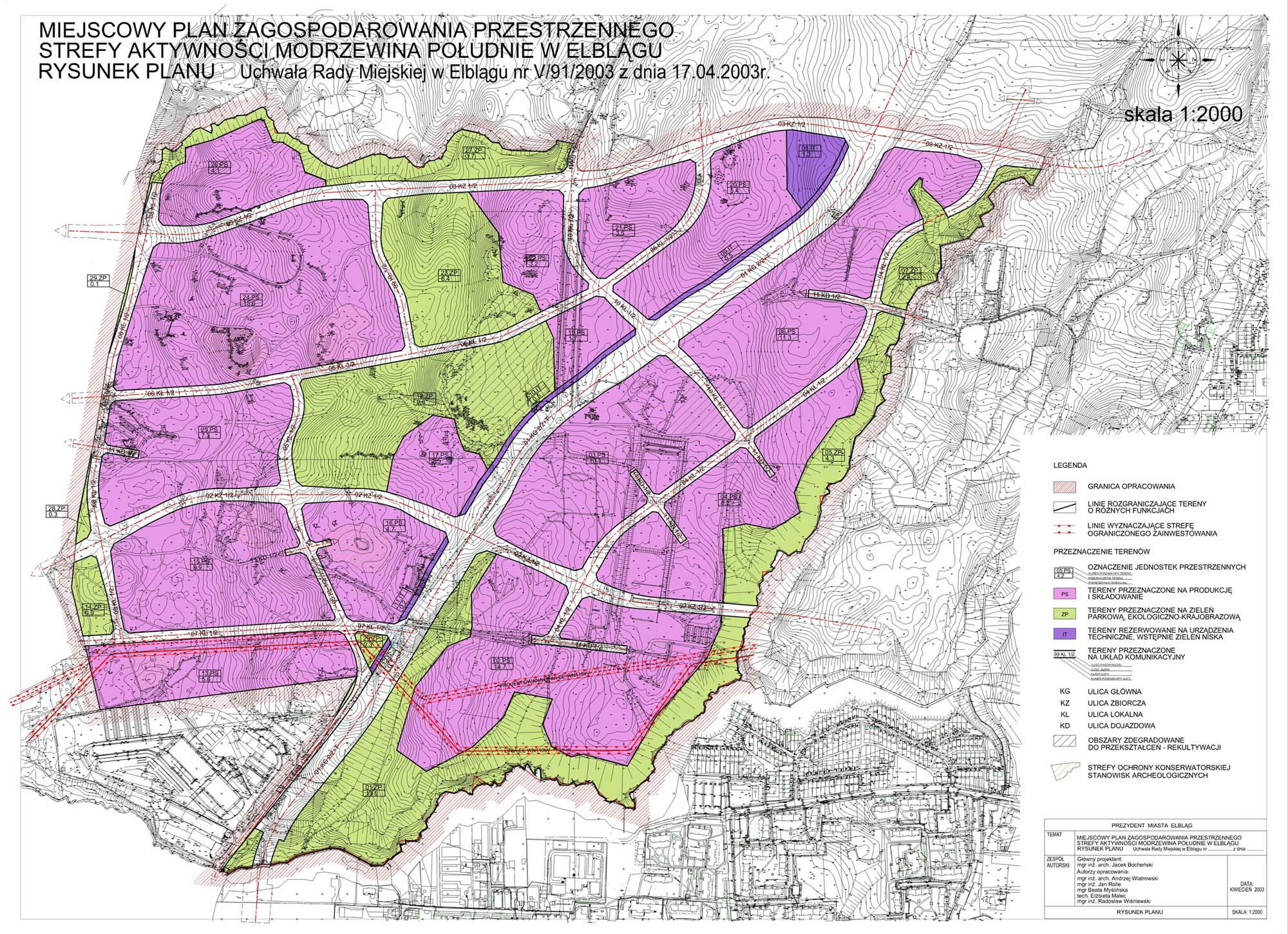 Miejscowy Plan Zagospodarowania Przestrzennego terenu Modrzewina-Północ